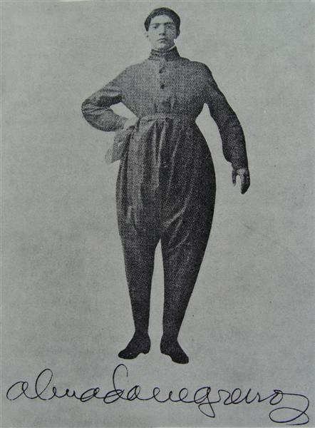 Summary Foto de Almada Negreiros na I Conferência Futurista, Abril de 1917. Licensing 18:18, 8 Abril 2006 Joseolgon 442x600 (43326 bytes) (Foto de Almada Negreiros na I Conferência Futurista, Abril de 1917.)